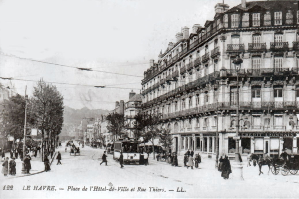 Tramway du Havre - Rue Thiers et place de l'Hôtel-de-Ville